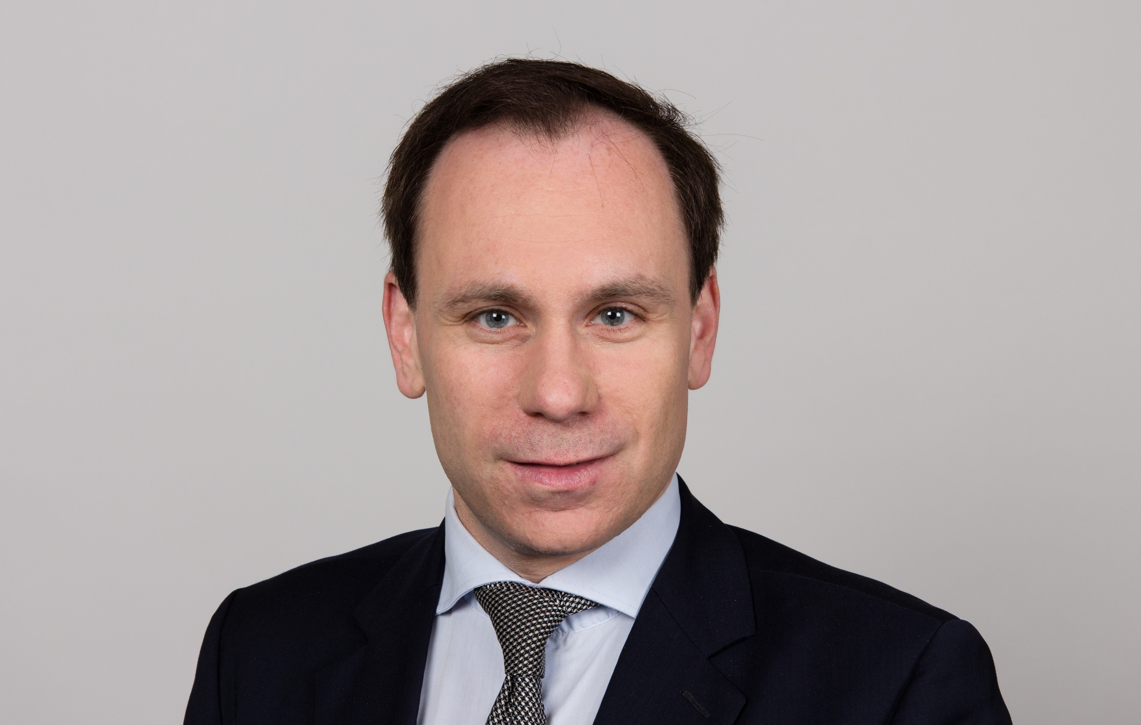 Volker Ullrich (* 14. Oktober 1975 in Illertissen) ist ein deutscher Politiker (CSU). Wikipedia-Bundestagsprojekt 2014 8–12 September 2014 in BerlinThis file was taken during the project “Wiki loves parliaments/Bundestag 2014” (German). Organisation: Martin Rulsch, Olaf KosinskyDesign: Martin KraftPhotography: Foto-AG Gymnasium Melle (Jan-Kristof Blömke, Lukas Eismann, Moritz Kosinsky, Laura Lessing, Karsten Mosebach, Mascha Mosebach, Teresa Schreer, Noah Sewöster, Niklas Tschöpe), Olaf Kosinsky, Martin Kraft, Harald Krichel, Steffen Prößdorf, Ralf Roletschek, Martin Rulsch, Gerd Seidel, Sven TeschkeVideo: Marc Rudnick, Manuel SchneiderEditors: Marcus Cyron, Günter Fremuth, Martin Kraft, Robin Krahl, Harald Krichel, Martin Rulsch, WikiAnikaReception: DasMonstaaa, Leonie Rabea Große, Lutheraner, Nina Möllering, Martin Rulsch, WikiAnika, Foto-AG Gymnasium MelleCosmetics: Regina Bosak, Bettina Dieguez, Sandra Kobbe, Andrea Strehlke; Irada Abdullayeva, Vivien Abelmann, Olena Engelbrecht, Sarah Fabini, Nina Magnus, Jacqueline Schmidt, Leonie Taboada, Julia Willer Usage information If you need more information how to use this file, please send an email to . Personality rights warningAlthough this work is freely licensed or in the public domain, the person(s) shown may have rights that legally restrict certain re-uses unless those depicted consent to such uses. In these cases, a model release or other evidence of consent could protect you from infringement claims.